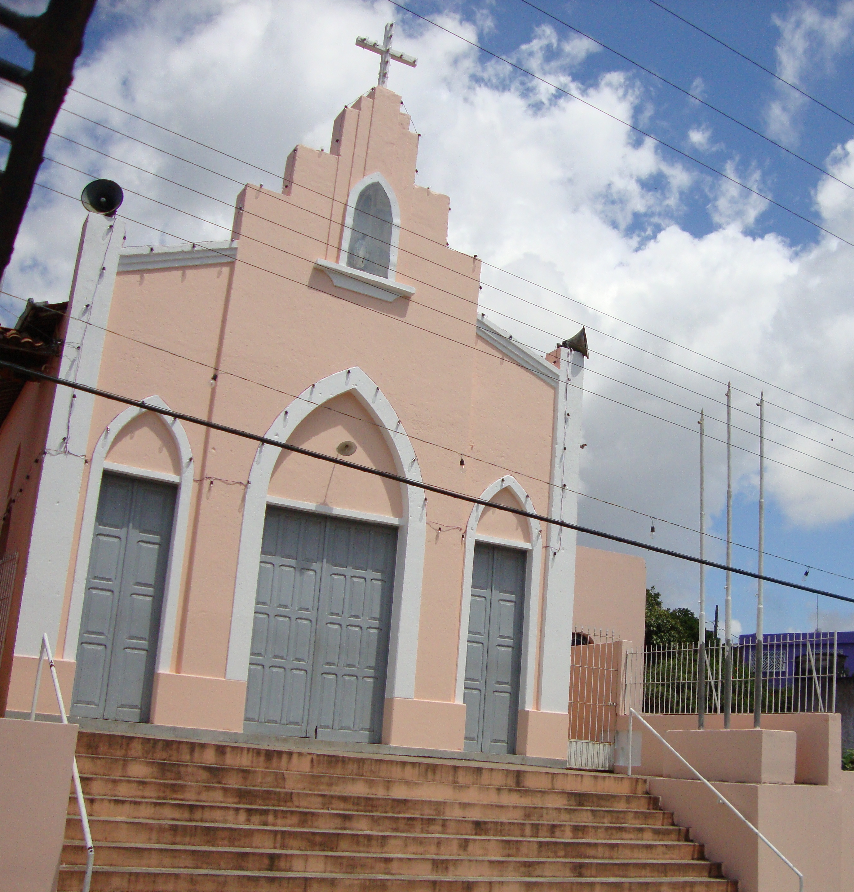 Igreja de São Severino - Matinadas - Umbuzeiro - PB.